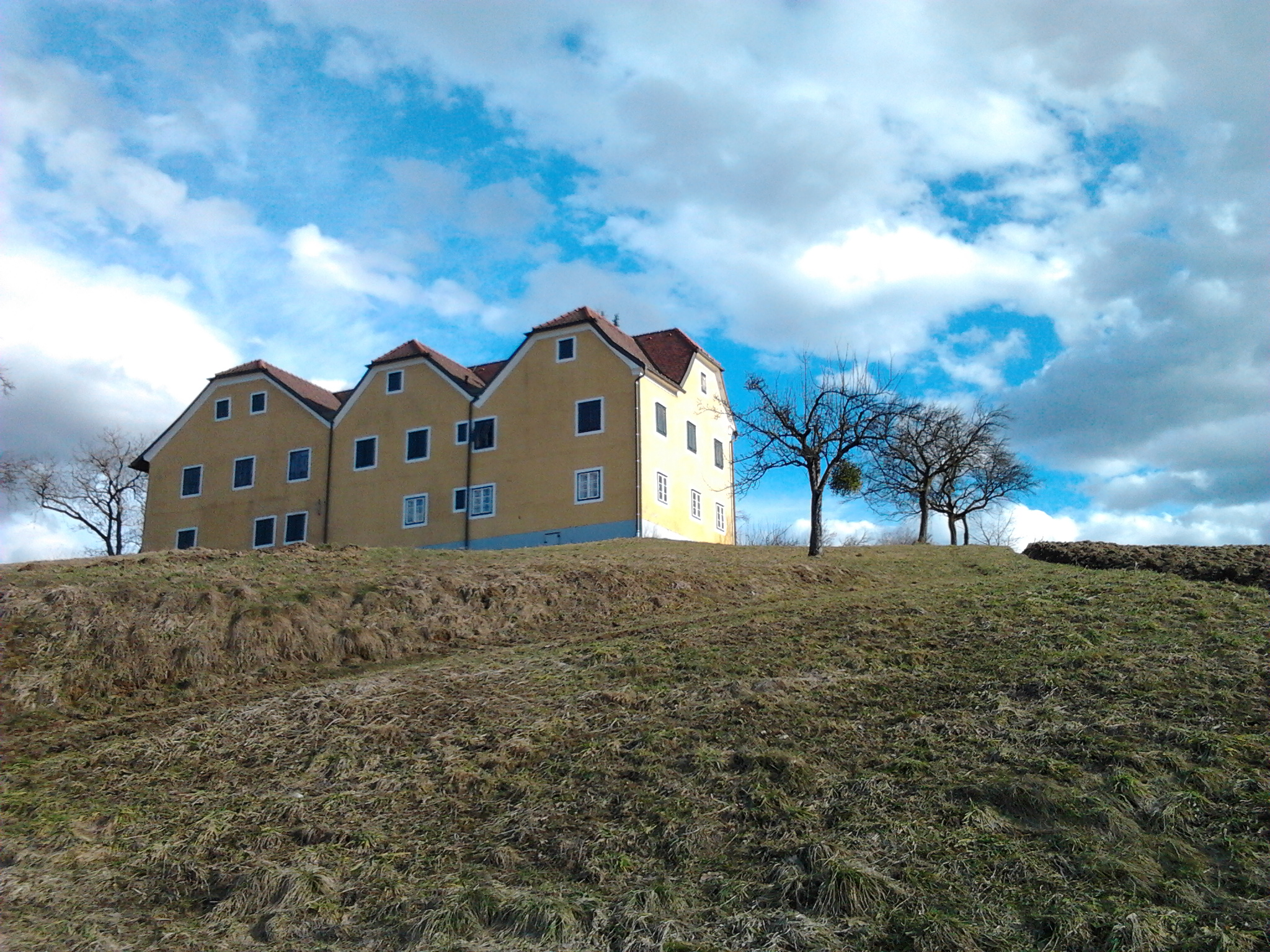 Sogen. Hallerschloss mit Kapelle